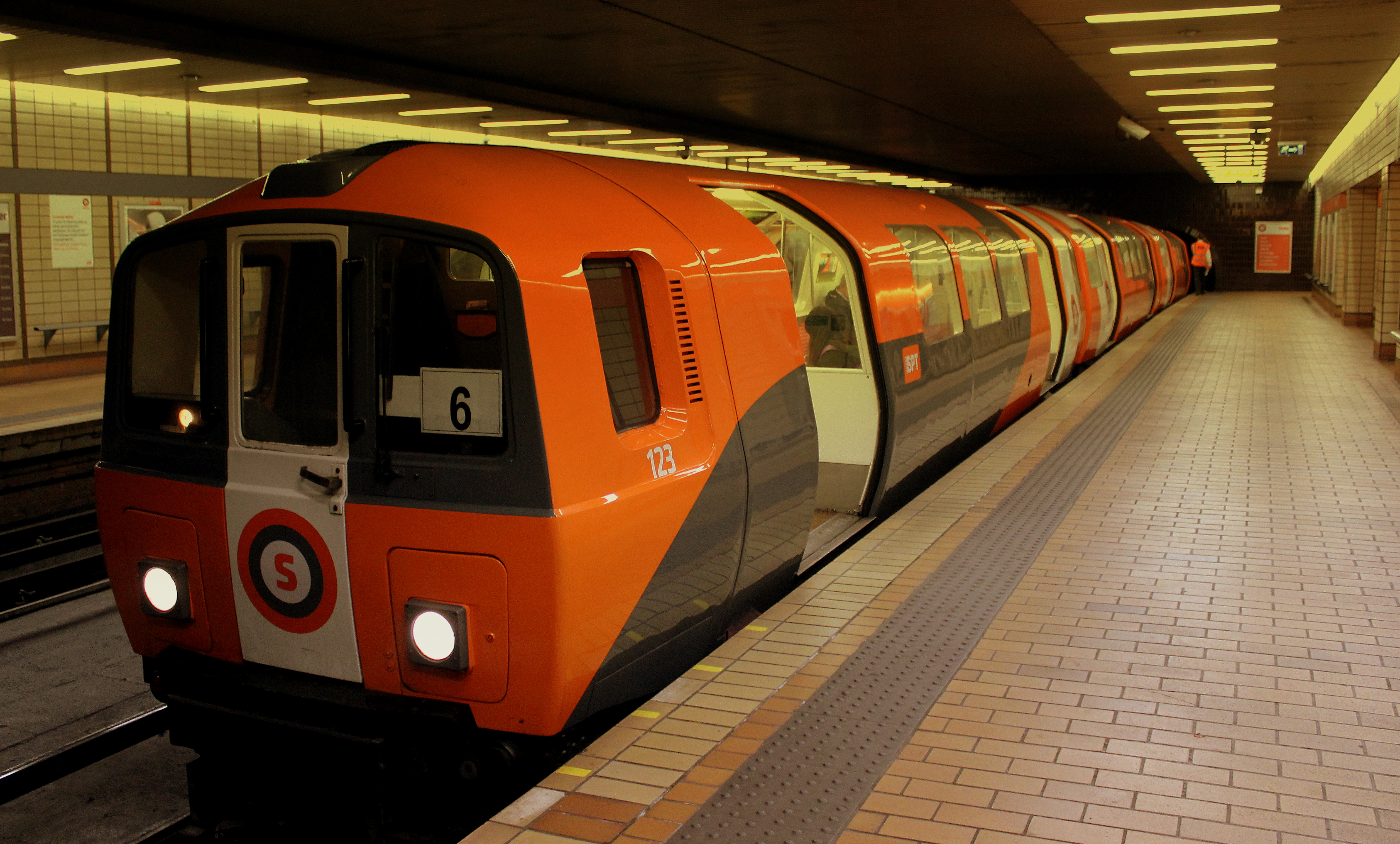 GLASGOW SUBWAY BUCHANAN STREET SCOTLAND SEP 2013